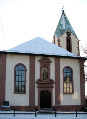 St.-Peter-und-Paul-Kirche in Mannheim-Feudenheim